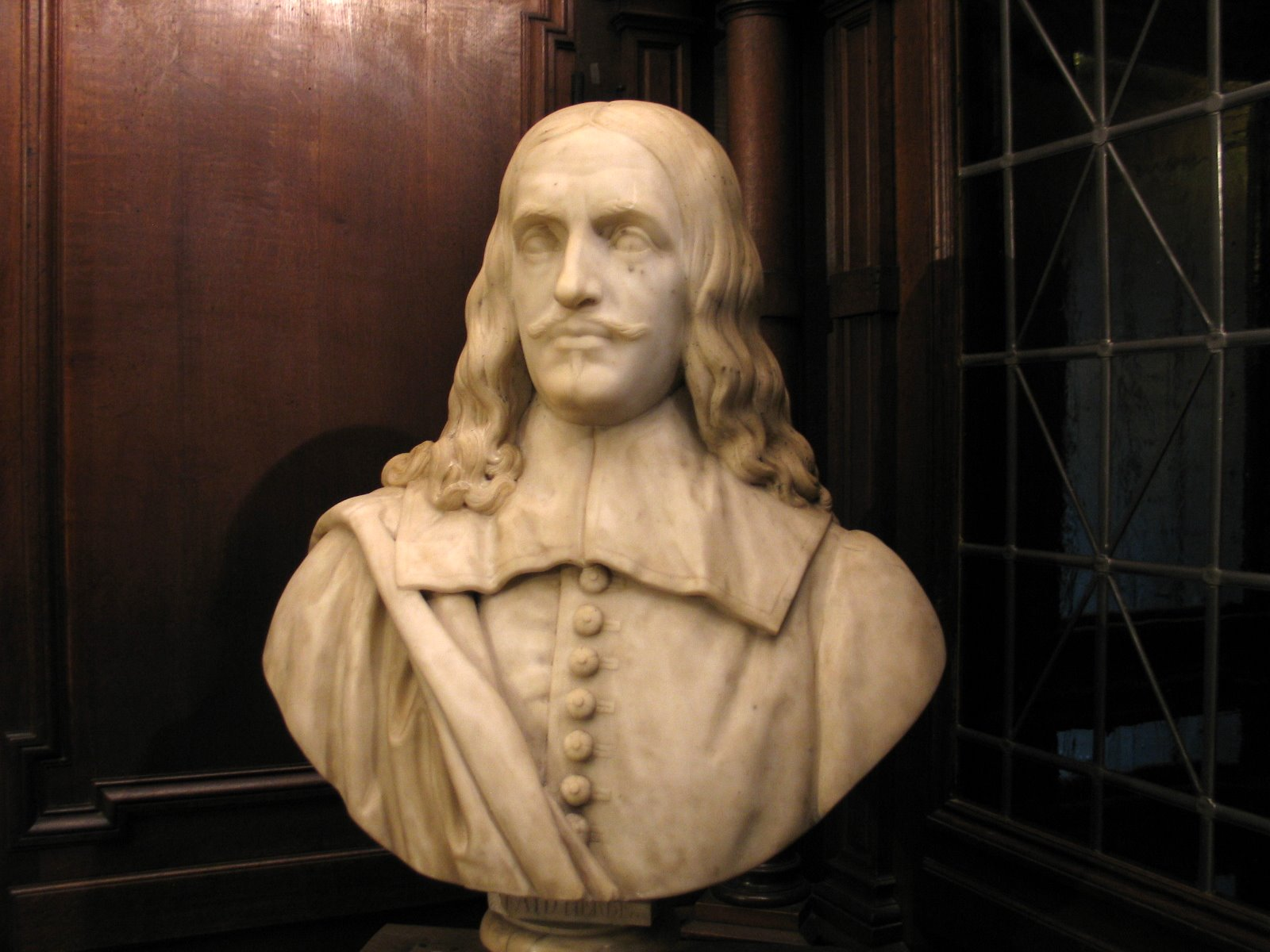 Lucas Faydherbe - eigen foto